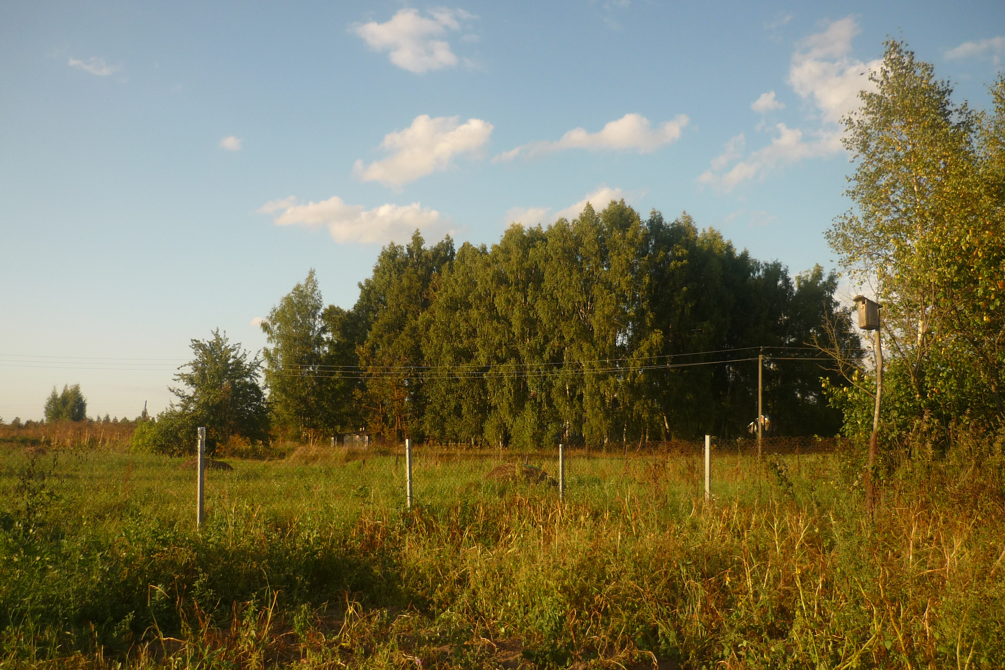 Conspectus Agaponovinis